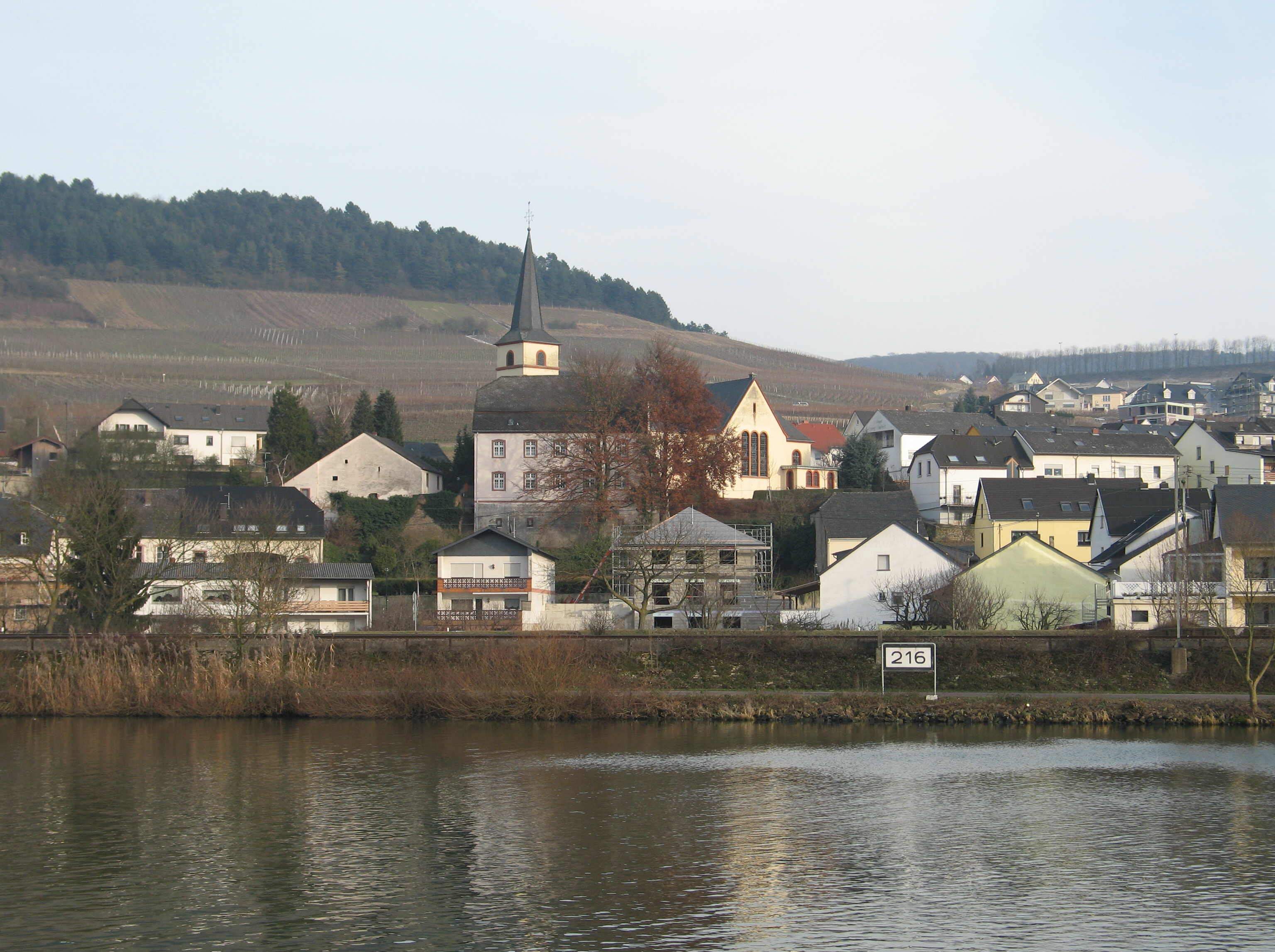 Nëttel